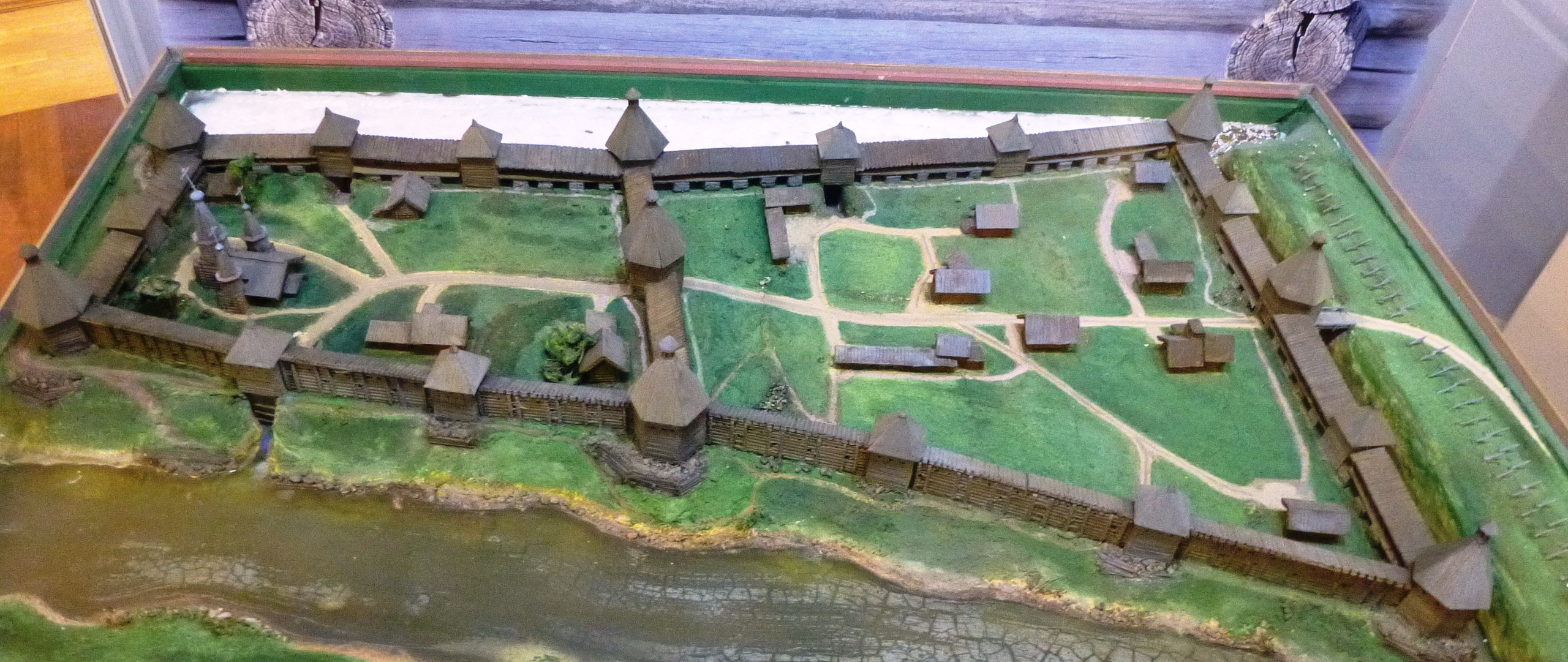 Макет крепости в Олонце XVII в.(источник - Национальный музей Республики Карелия)